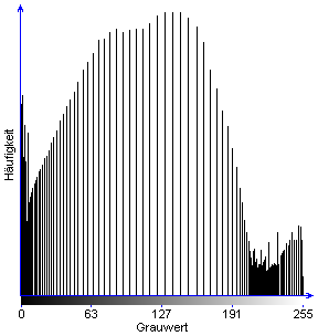 Histogramm des Bildes 113766main 04272005 tinyCrators grey hyper033.png Quelle: selbst erstellt